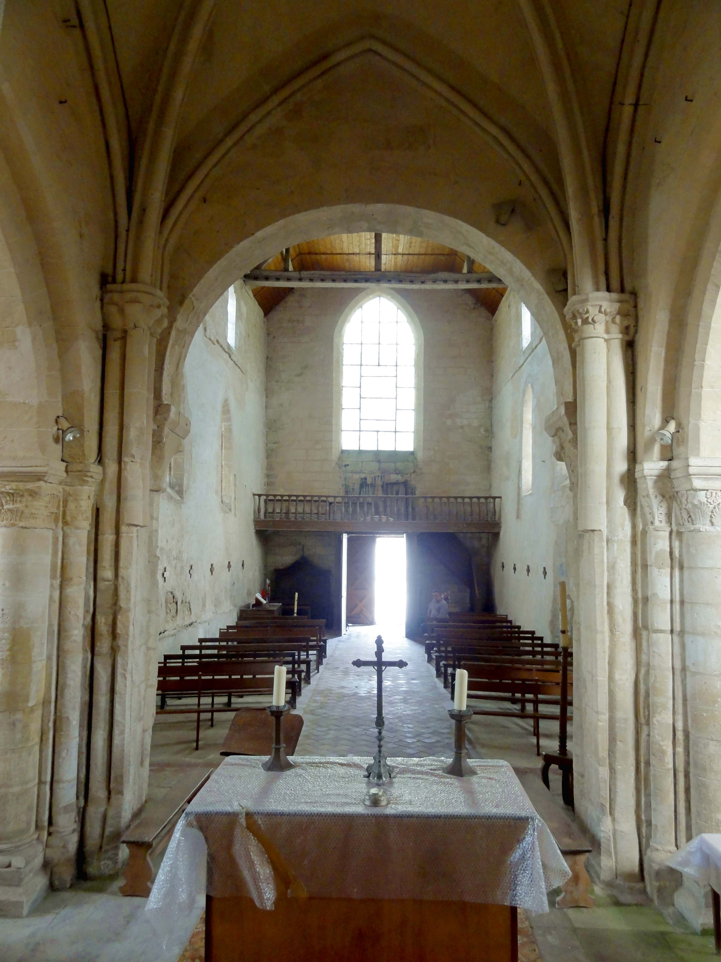 Intérieur de l'église (voir titre).